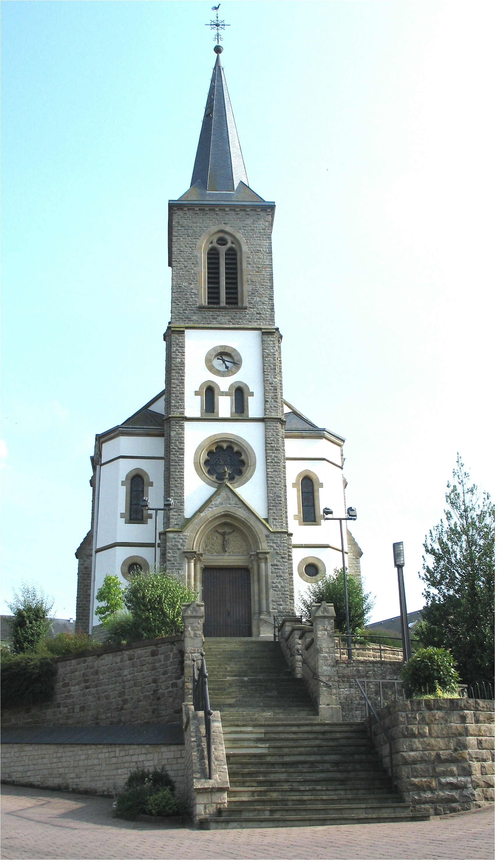 D'Kierch vu Kruuchten